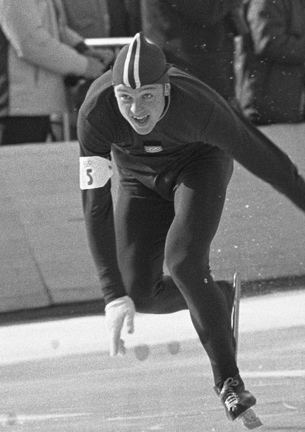 Tom Gray